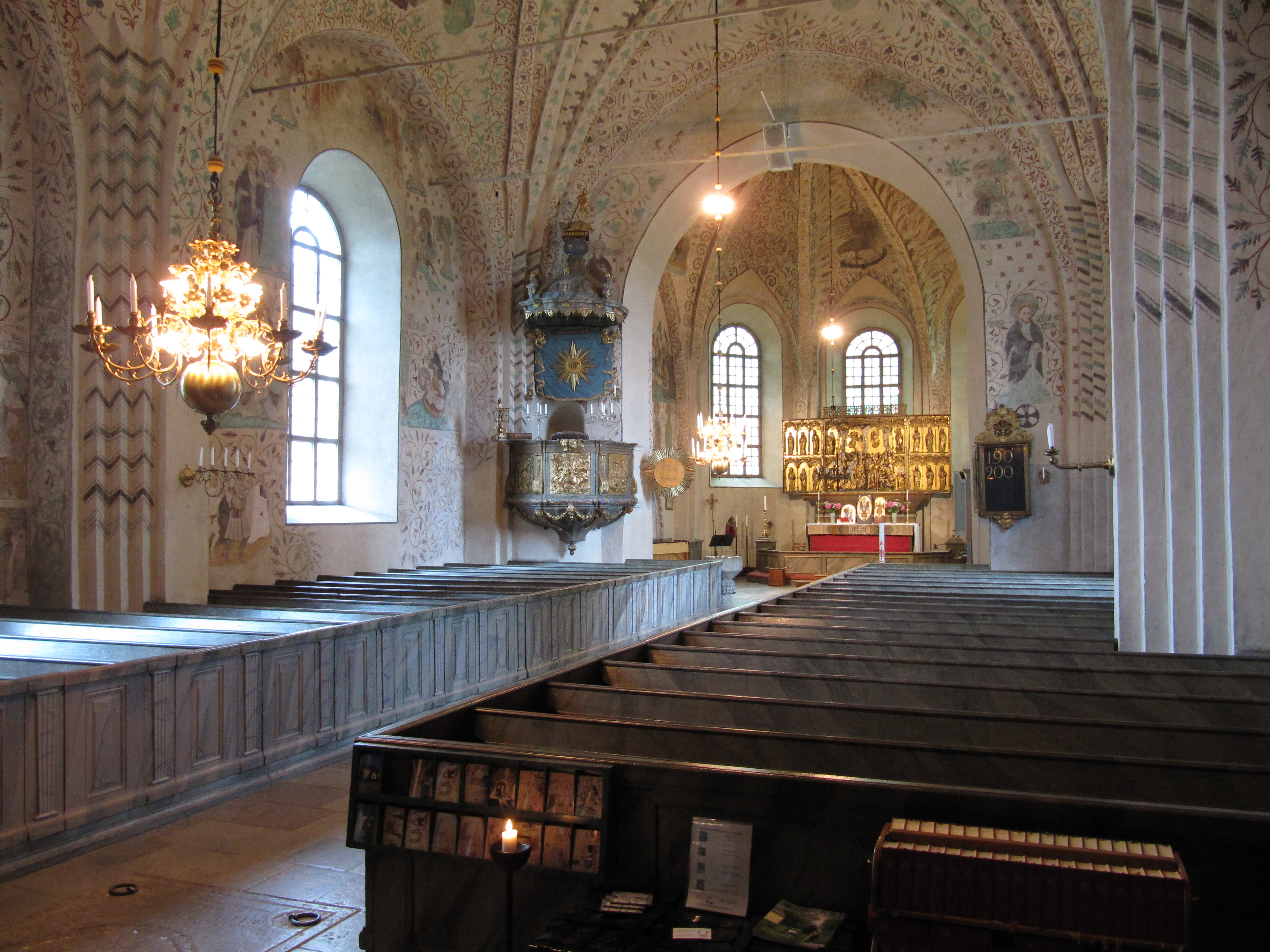 Kyrkorum i Tensta kyrka; Cirka 60 % av kyrkans kalkmålningar på väggarna är målade av Johannes Rosenrod. Bengt Jönsson (Oxenstierna), (född i början av 1390-talet (senast 1393), död 1450) var riddare, riksråd och under några månader 1448 svensk riksföreståndare. Bengt Jönssons sätesgård var på Salsta slott i Lena socken i Norunda härad, Uppland. Han gjorde stora donationer till Tensta kyrka och finns därför avbildad på kyrkväggen i form av ett s.k. donatorsporträtt av Johannes Rosenrod.